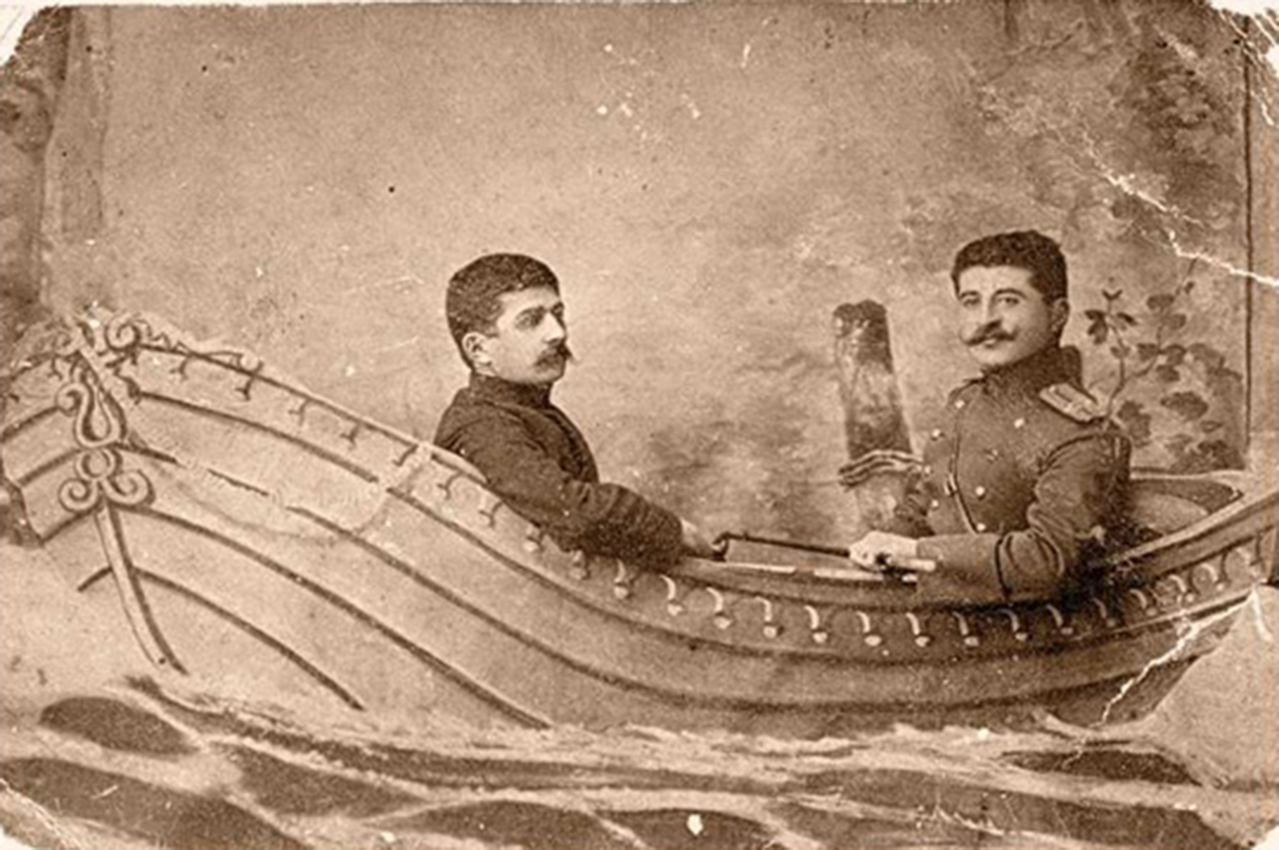 Данилбек (слева) и Назарбек Шериповы. Грозный, 1905 г